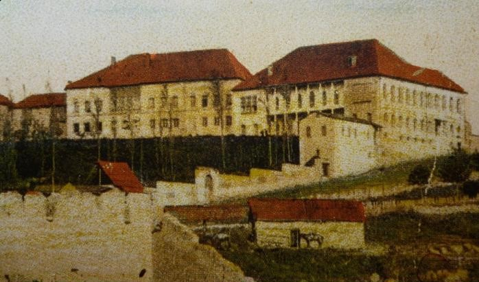 Şuşa qalasında Pənahəli xanın sarayı və ya Qarabağ xan sarayı